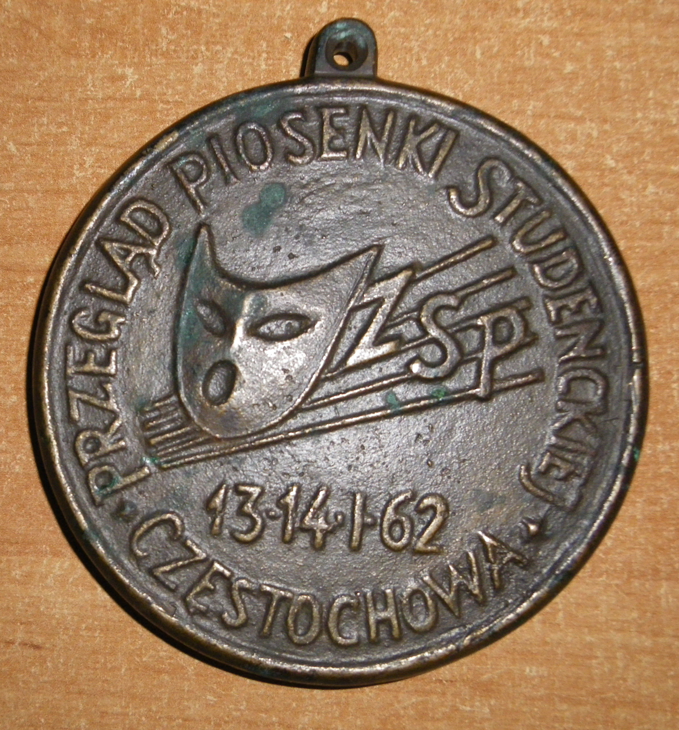 Zdjęcie medalu wręczanego wszystkim uczestnikom Przeglądu Piosenki Studenckiej w Częstochowie w 1962 r.